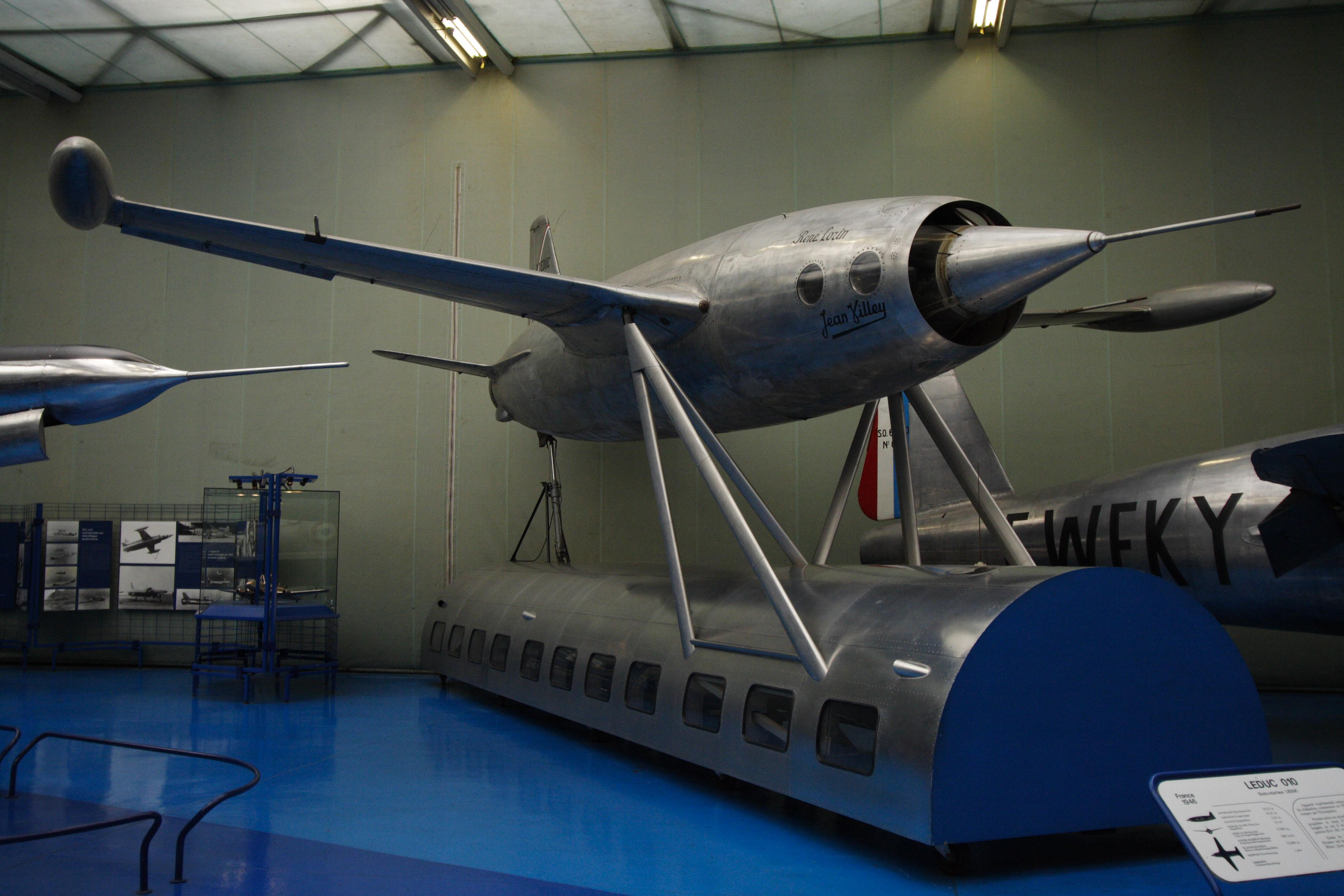 French experimental aircraft Leduc 010 with aerial launcher (Musée de l'air et de l'espace, Le Bourget, France)